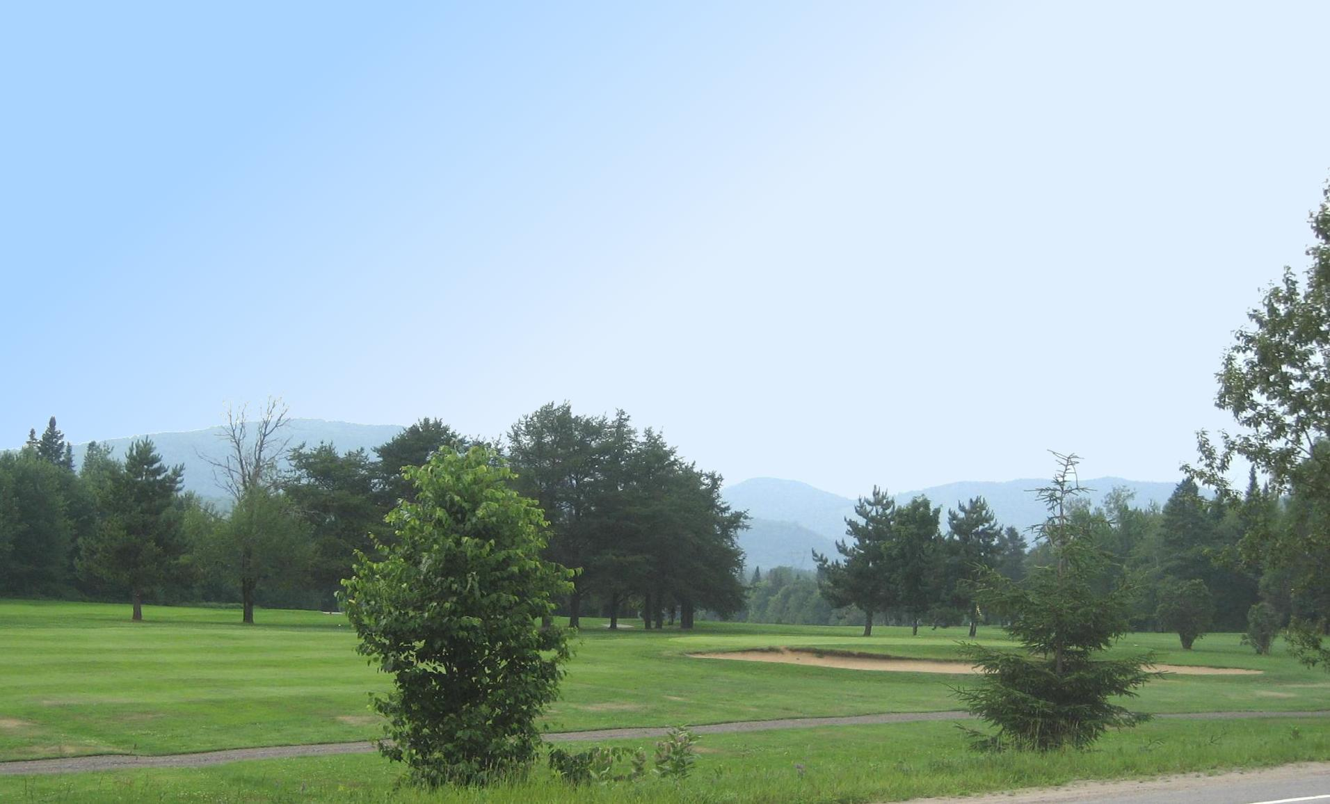 Club de golf à Stoneham Qc Canada